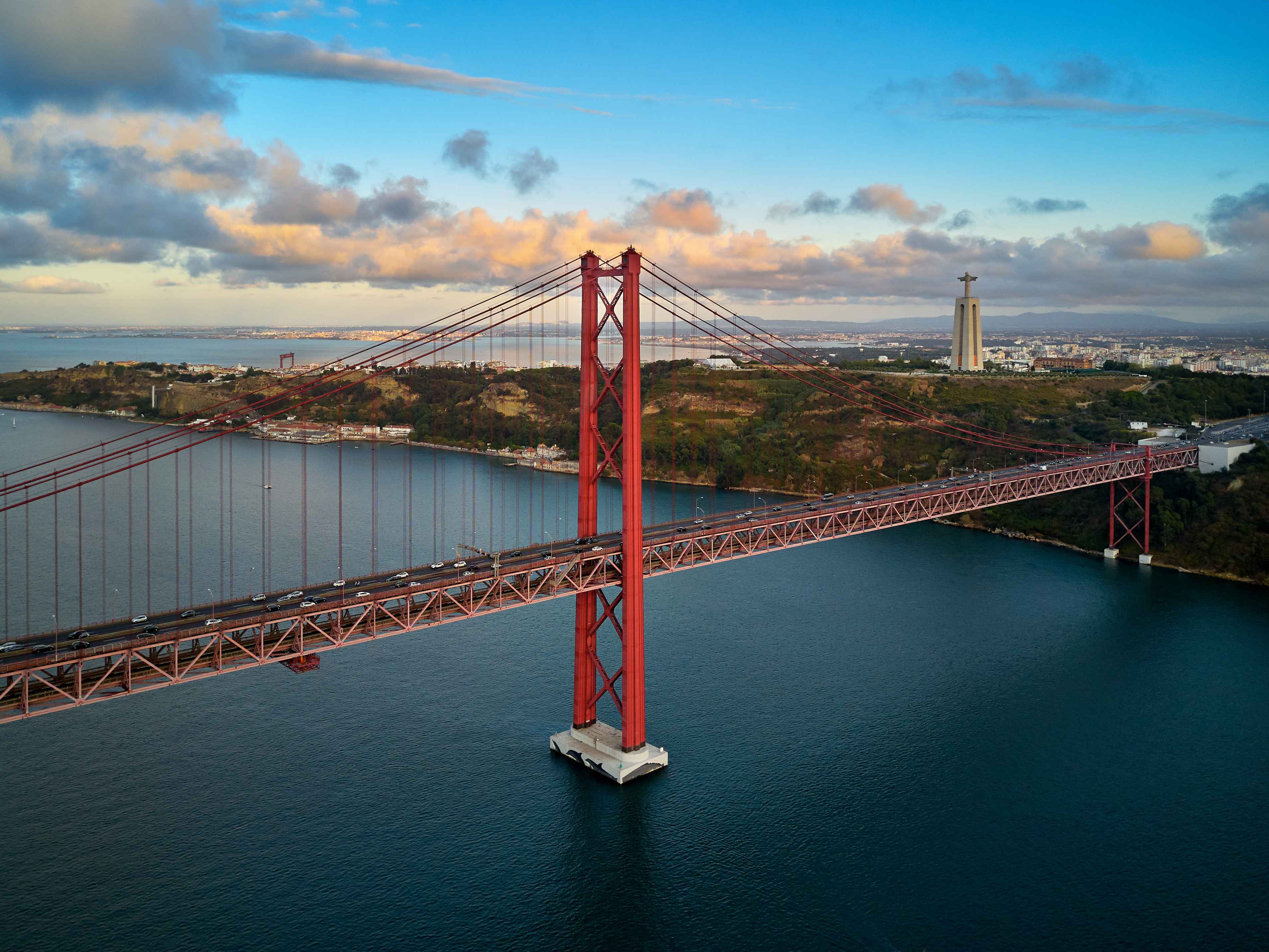 25 de Abril Bridge